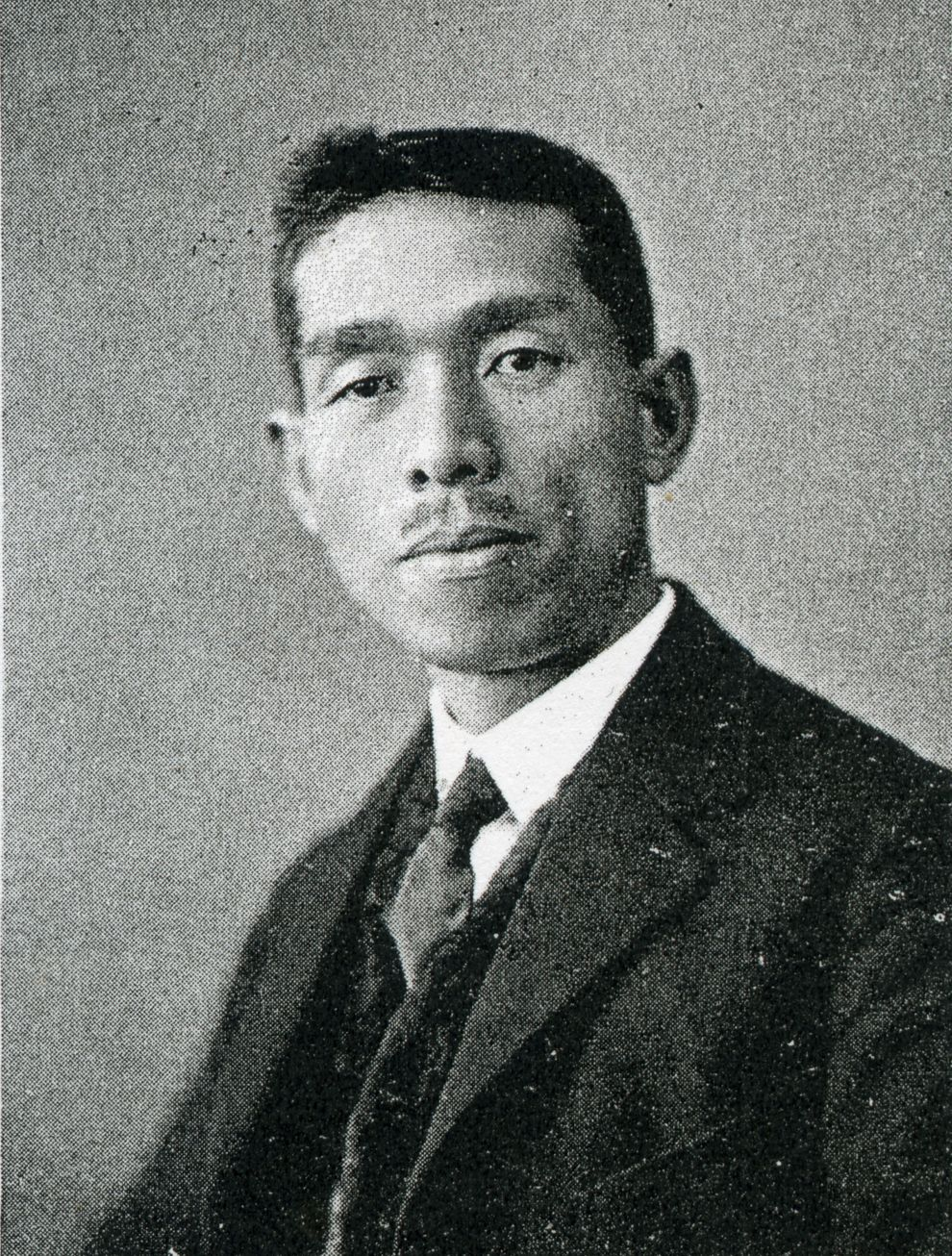 この写真は、福田五郎（1877-1931）の写真です。